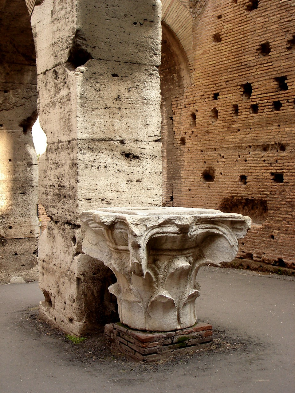 Composite capital at Colosseum